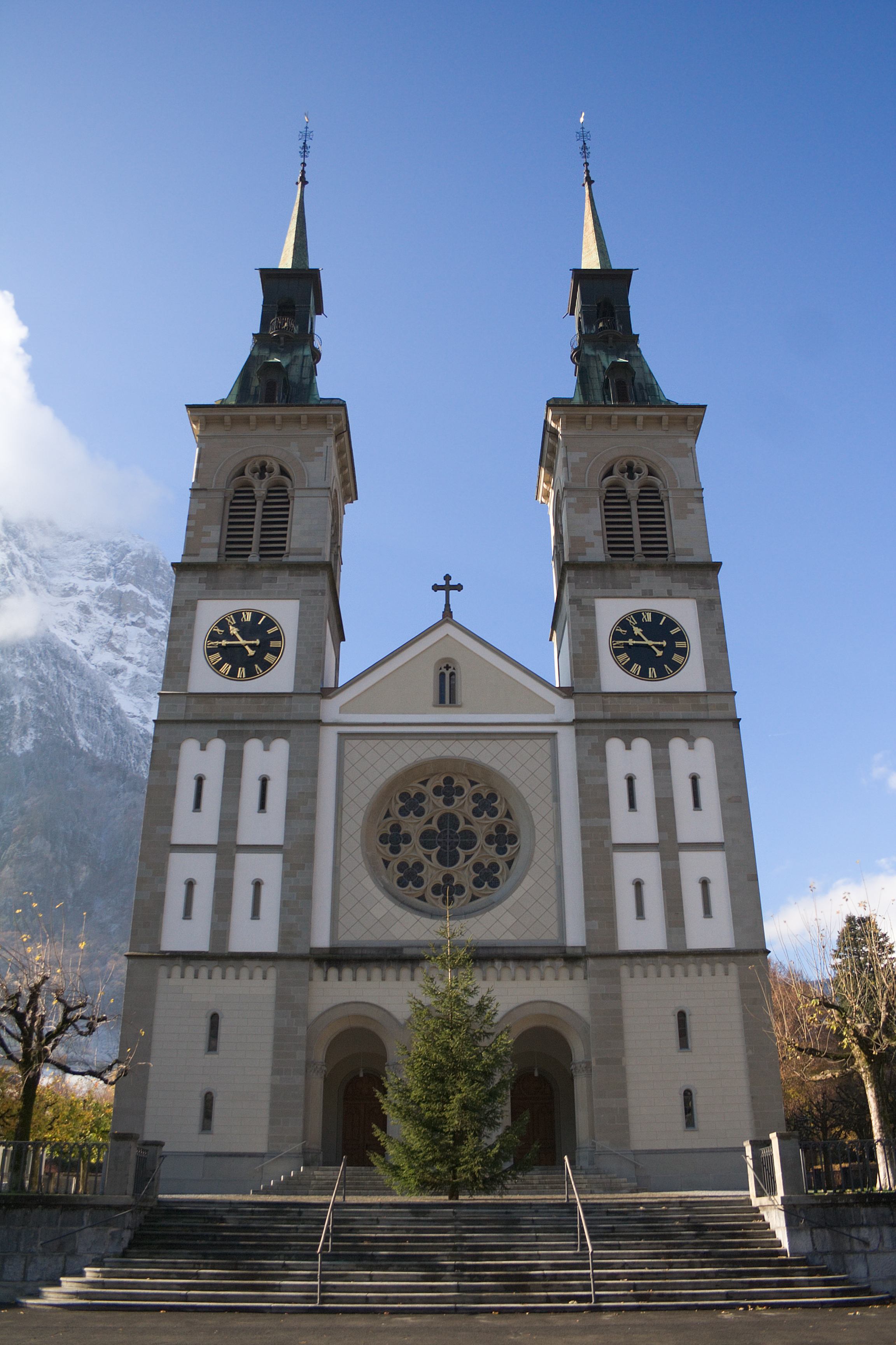 Stadtkirche Glarus, Schweiz